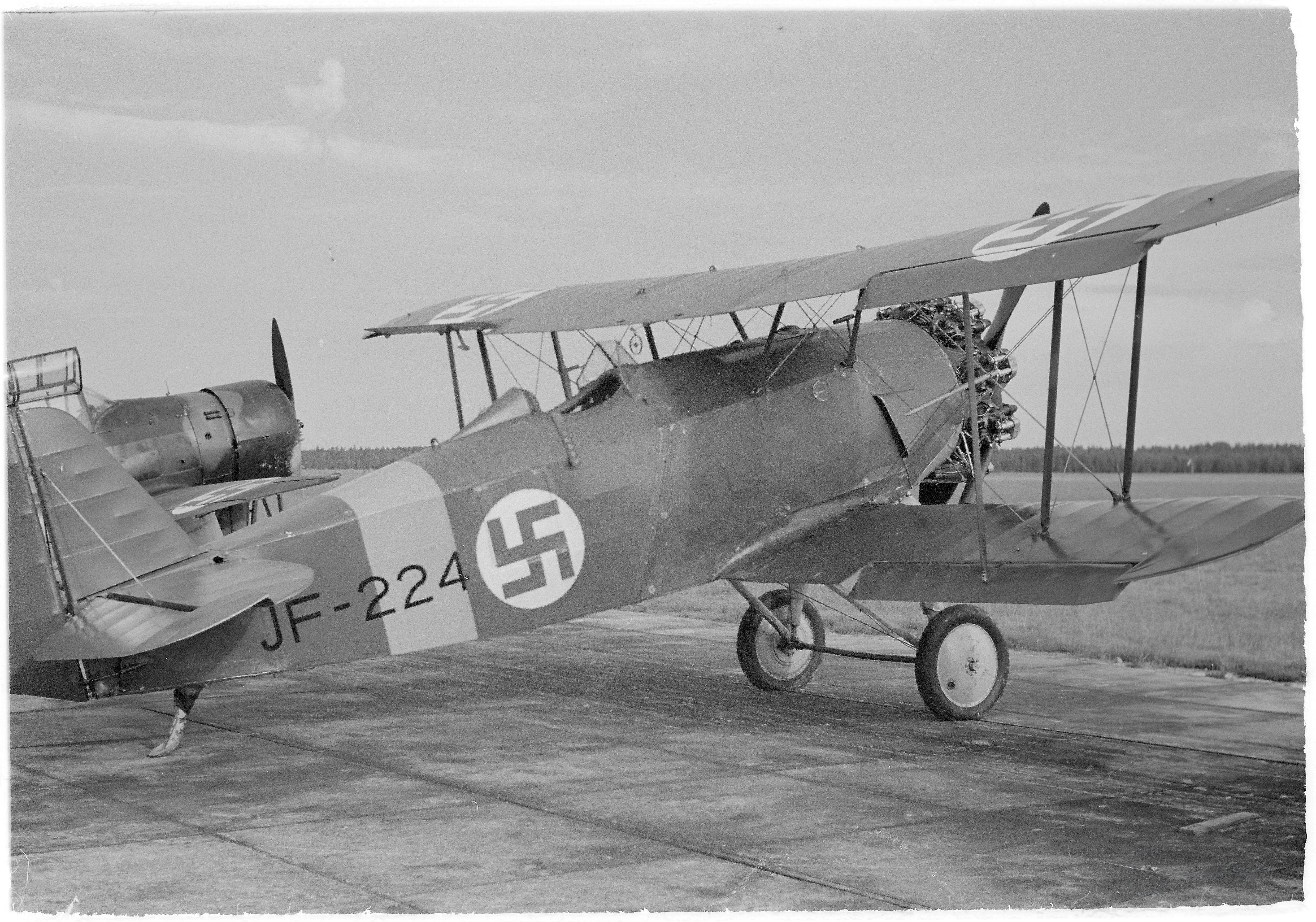 Nykyään harjoituskoneena käytetty ruotsalainen hävittäjä Jagtfalken (JF). (Kuvassa on Jaktfalken II) Kuvauspaikka: Kokkola-Kauhava